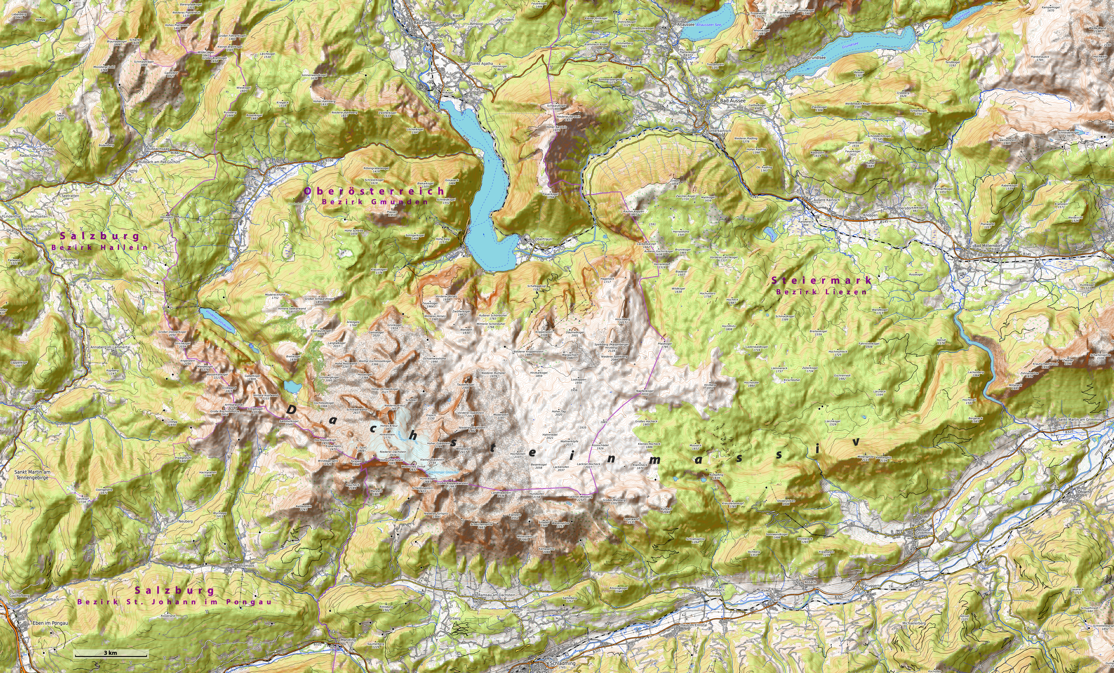 Karte des Dachsteinmassivs in Österreich